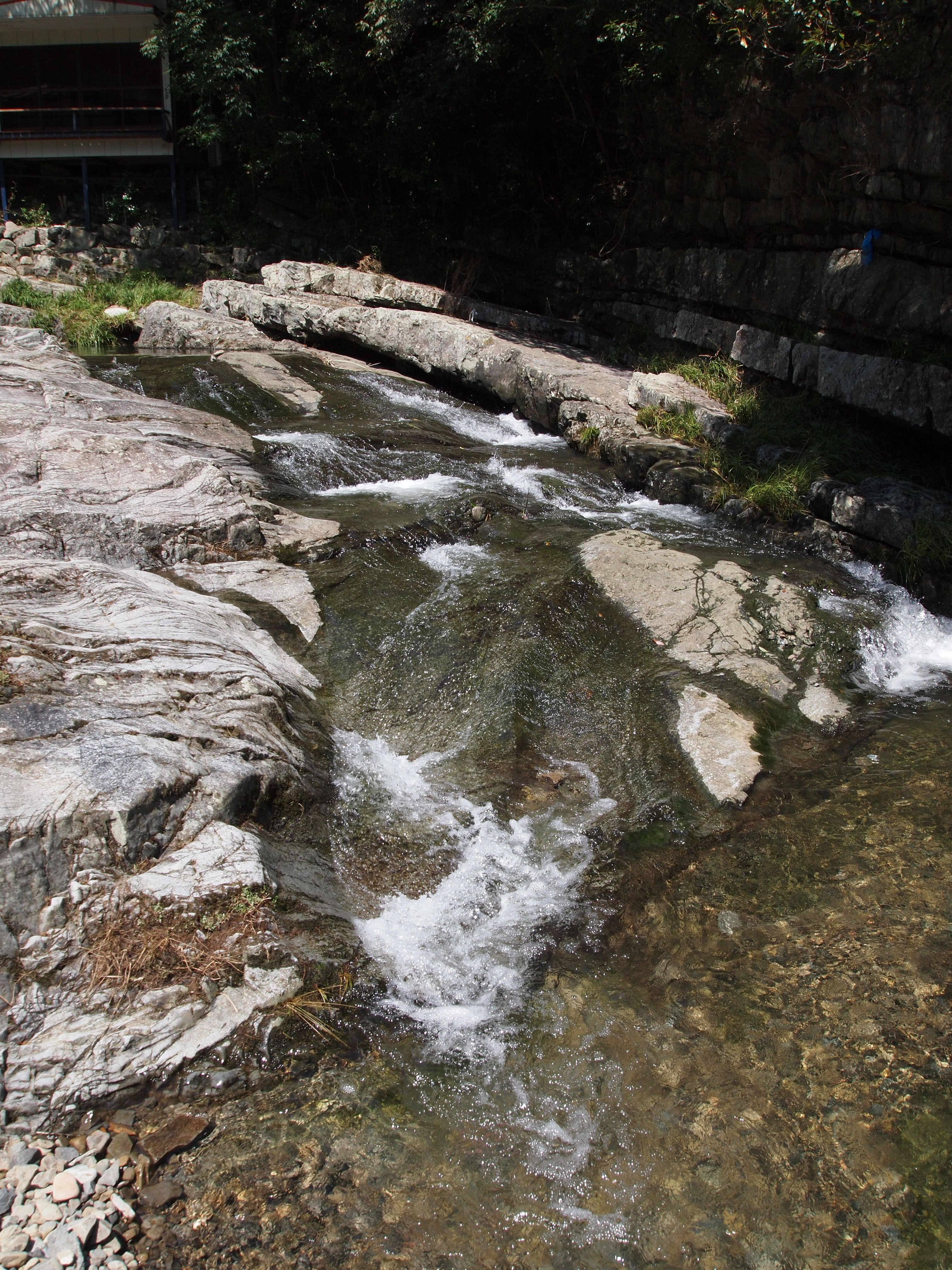 宮川内谷川 撮影地：徳島県阿波市土成町宮川内付近